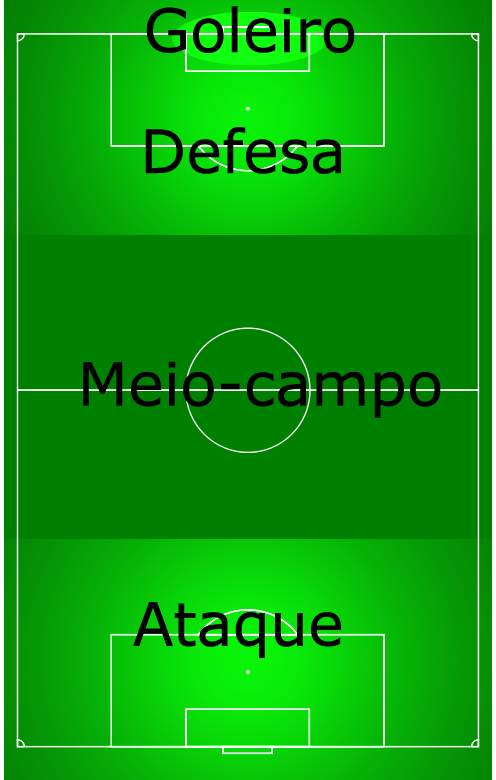 As três regiões do campo de futebol: setor defensivo, setor intermediário e setor ofensivo